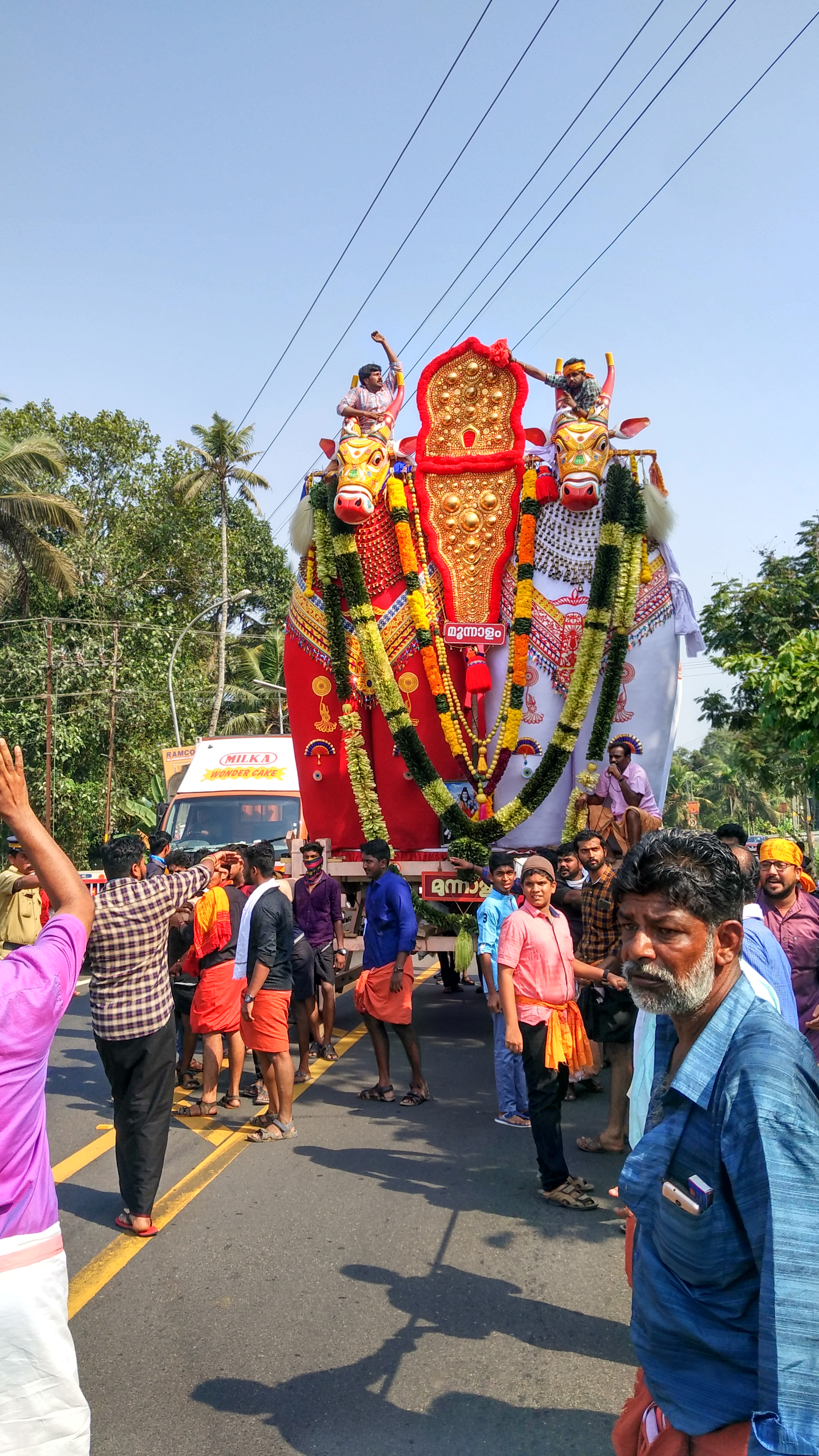 മൂന്നാളം കെട്ടുകാഴ്ച